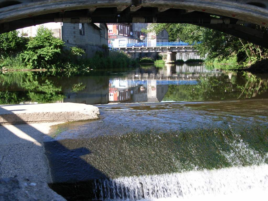 L`Oise Brücke in Hirson